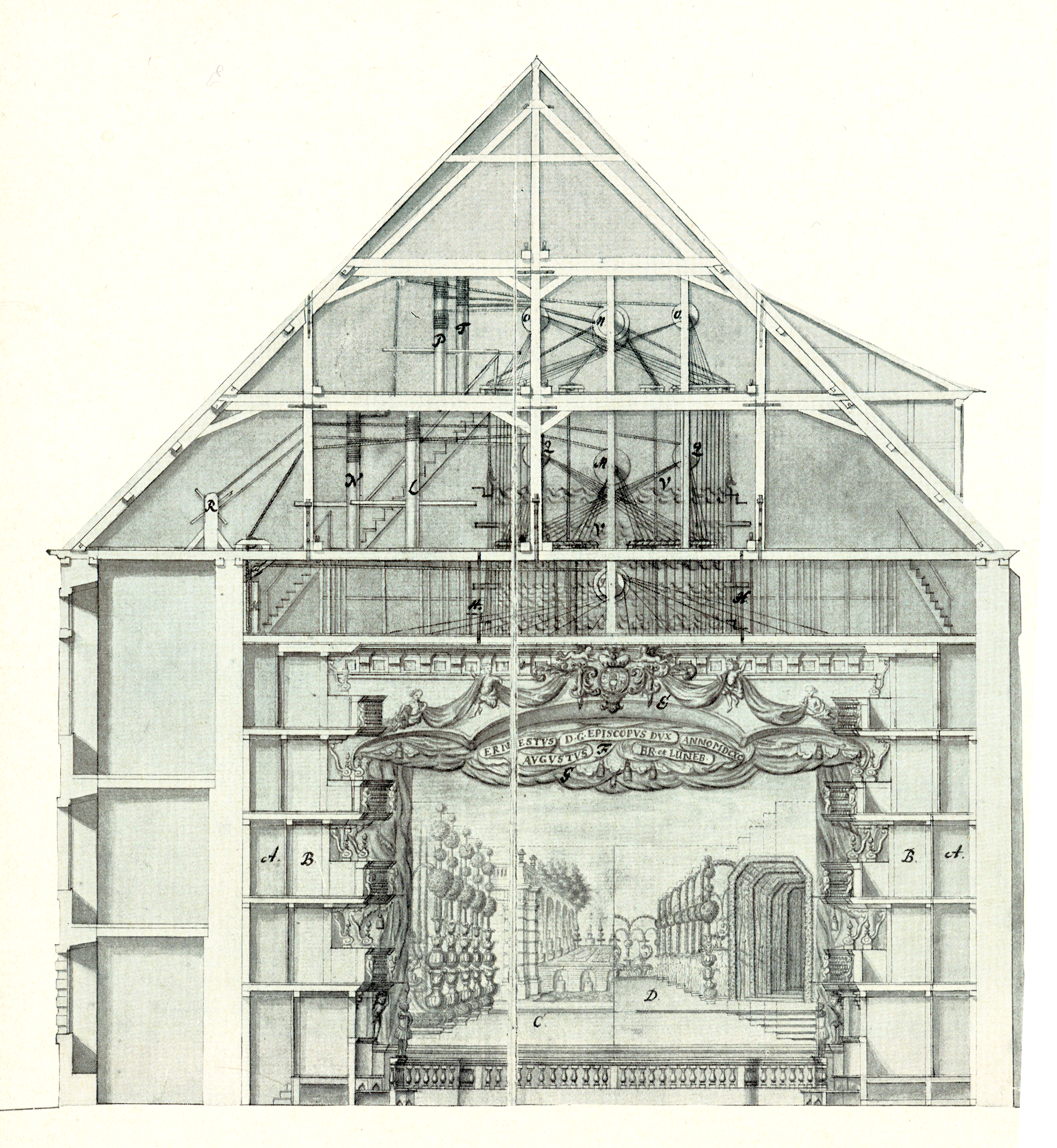 Querschnitt durch das Schlosstheater oder auch Schlossopernhaus am Leineschloss; Tuschzeichung durch den Königlich Großbritannischen und Kurfürstlich Braunschweig-Lüneburgischen Hofbaumeister Johann Friedrich Jungen, das beretis knapp ein halbes Jahrhundert zuvor nach Planungen von Girolamo Sartorio und Johann Peter Wachter am 30. Januar 1689 mit der von Agostino Steffanis nach einem Libretto von Ortensio Mauro komponierten Oper Enrico Leone eröffnet wurde ...